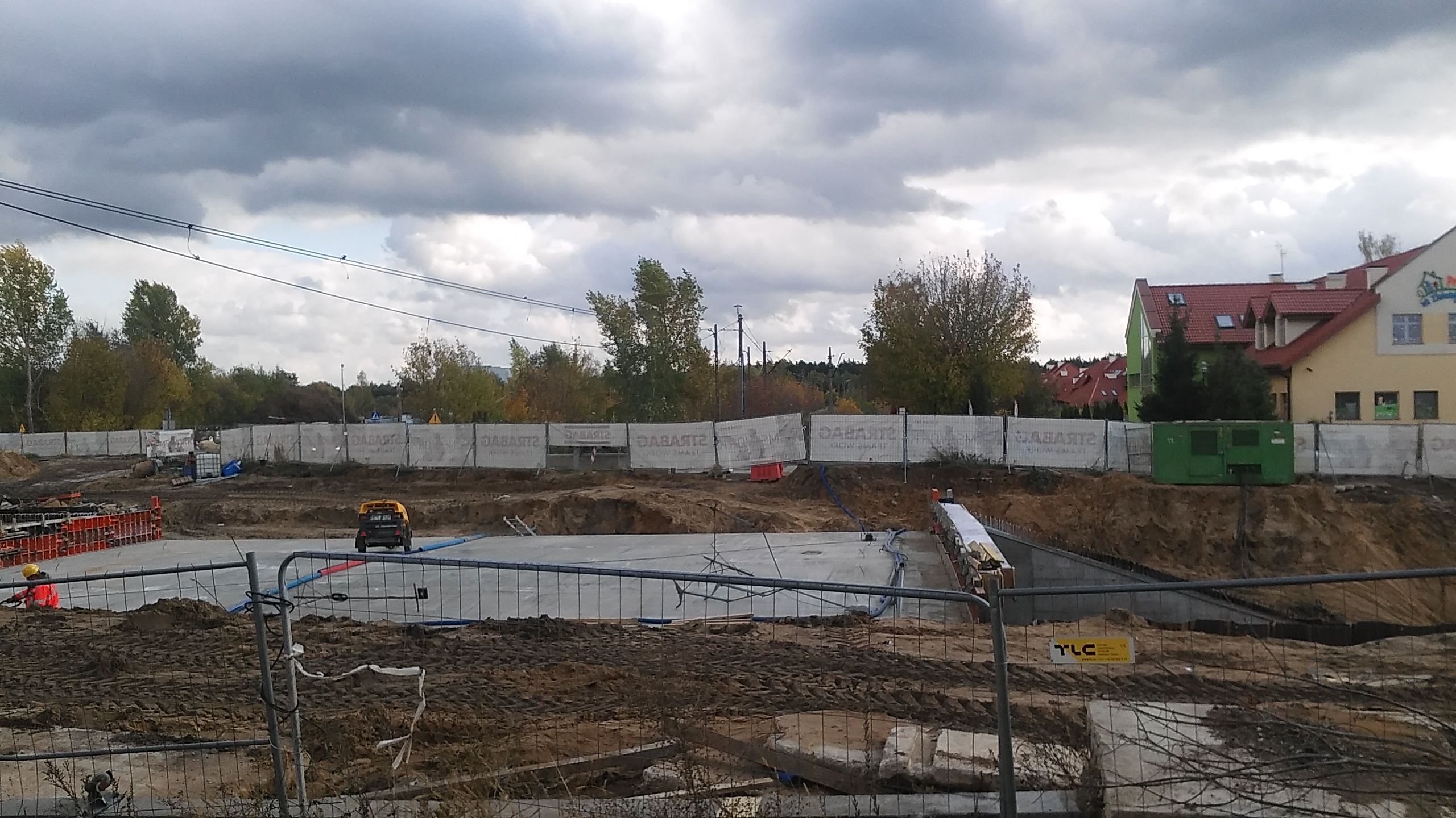 Białystok Starosielce, ul. Klepacka - budowa tunelu drogowego pod liniami kolejowymi nr 515 i 516. Widok od północy.